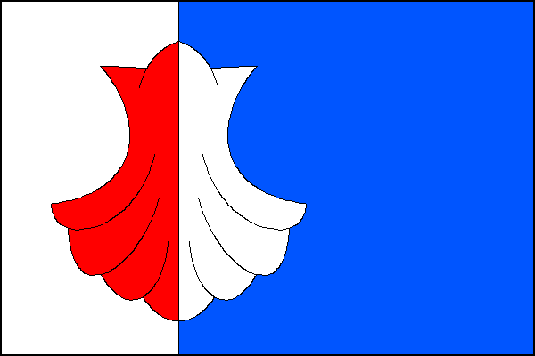 Vlajka, Velká Losenice, okres Žďár nad Sázavou